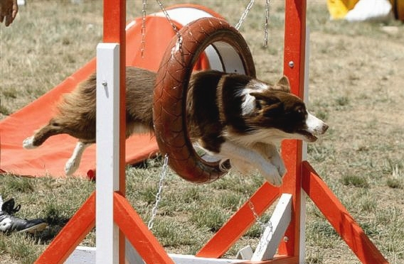 Border Collie (Tweed) en agility